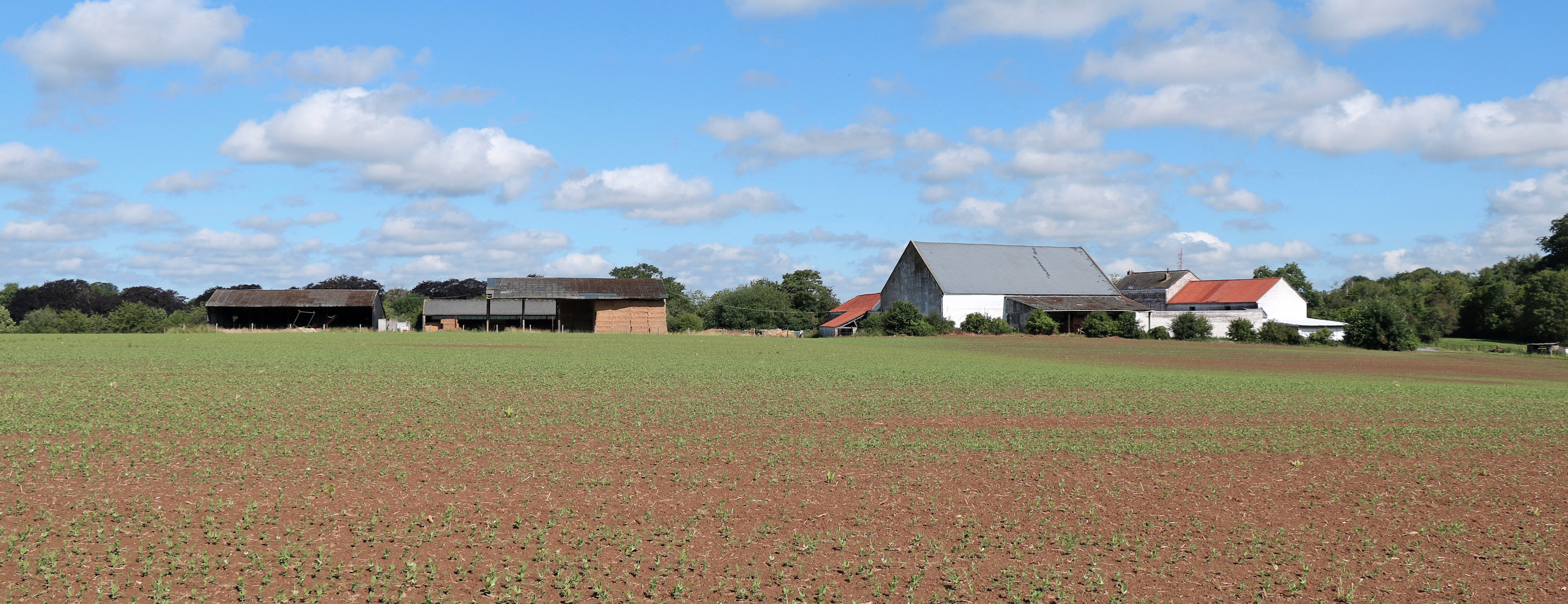 Belgique - Brabant wallon - Louvain-la-Neuve - Ferme de Lauzelle